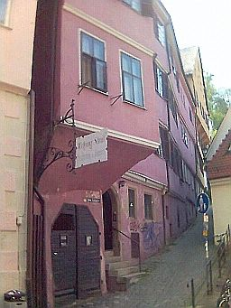 Ehemaliges Haus des Professors Georg Burckhardt, Haaggasse 19, Tübingen